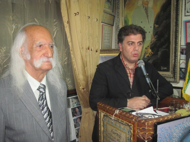 انجمن ادبی ناصر خسرو1